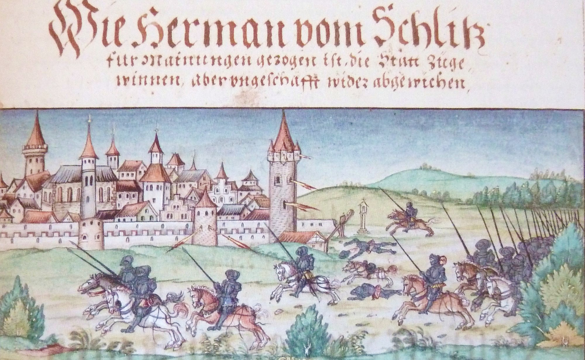 Kampf zwischen Bischof Otto von Würzburg und Heinrich von Schlitz um die Stadt Meiningen 1340